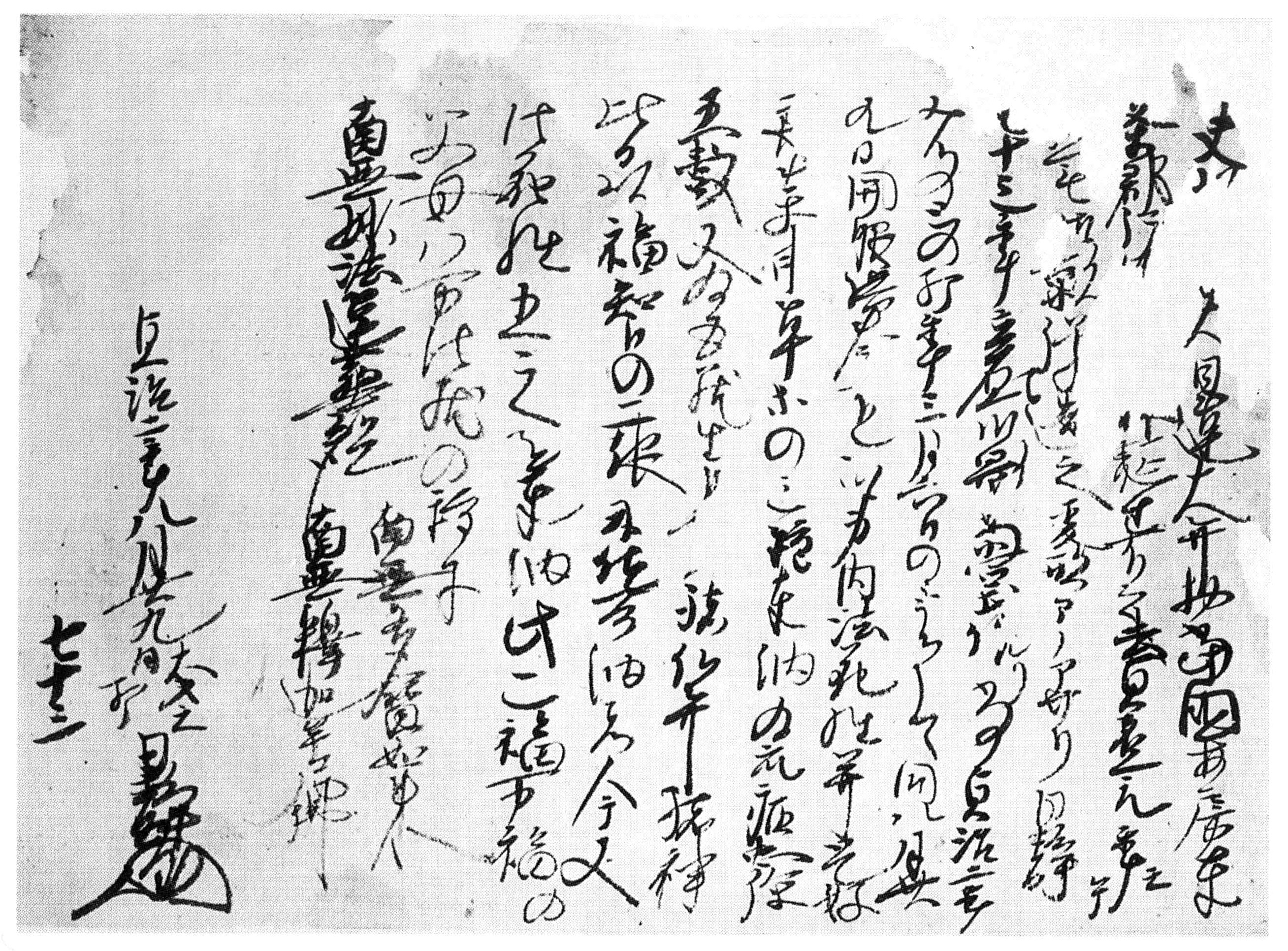 誕生寺御影体内文書